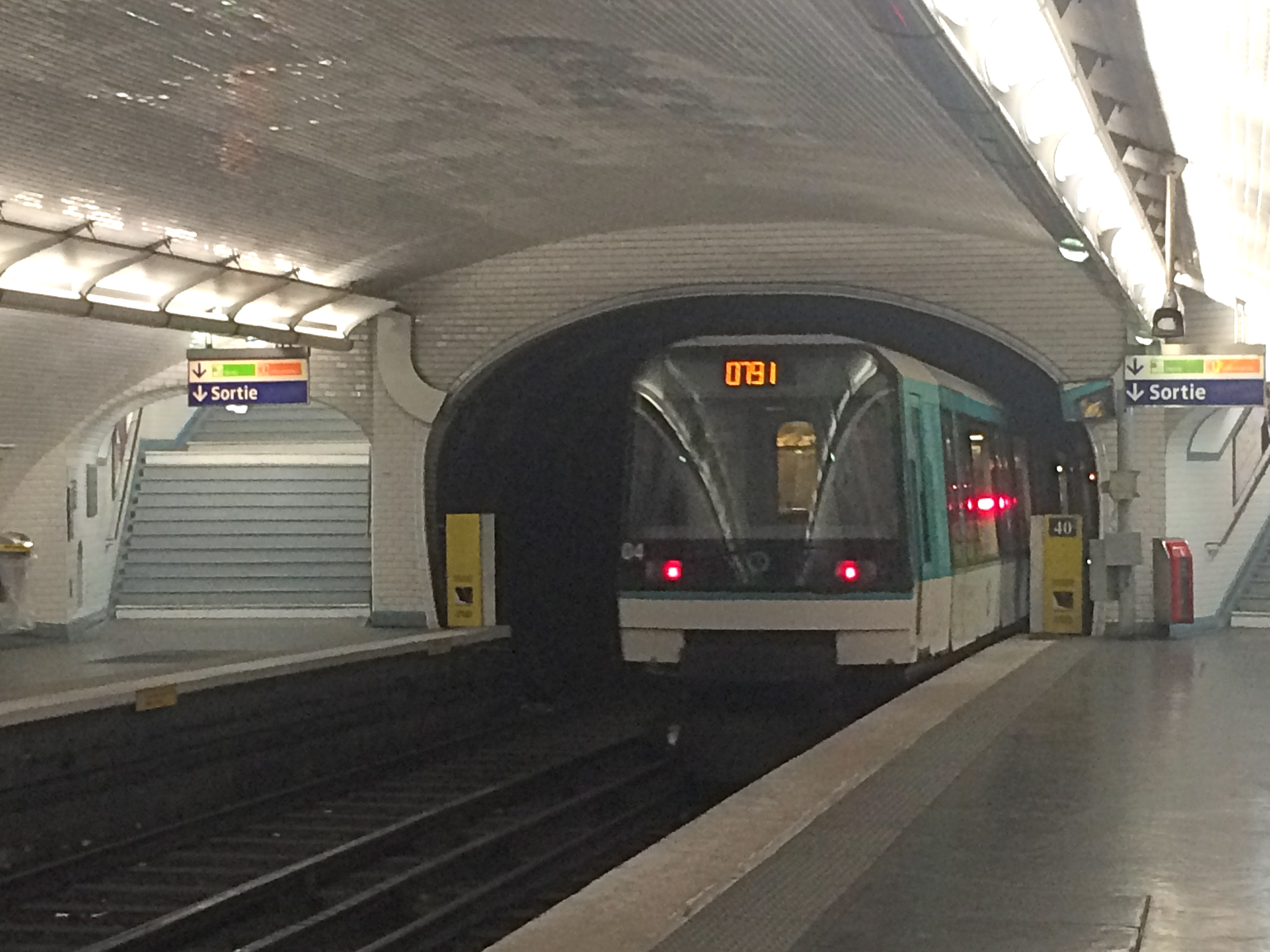 Station de métro Bolivar en mai 2016 : rames quittant la station direction Louis Blanc